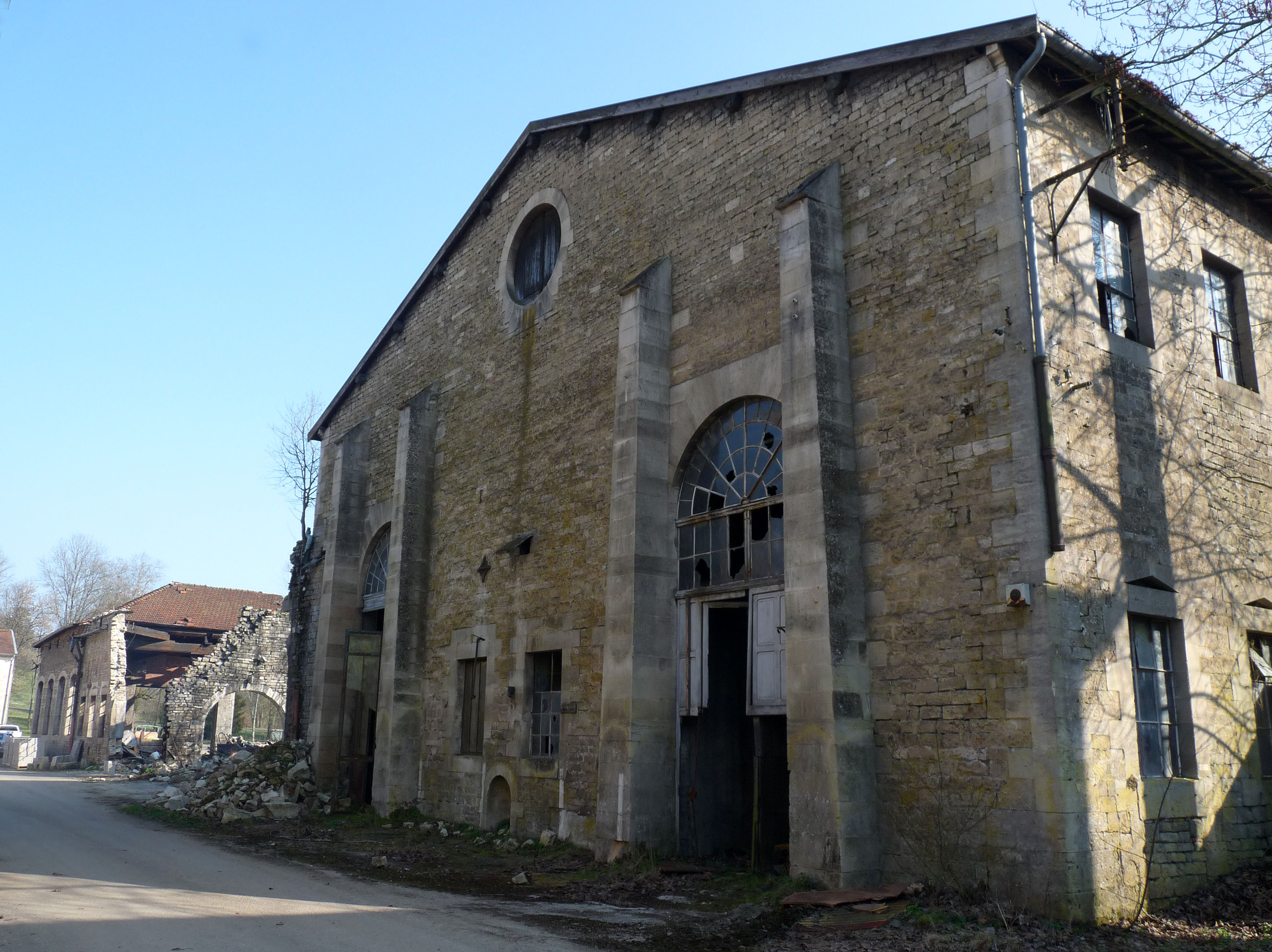 Démolition de l'ancienne fonderie d'art Val d'Osne (Haute-Marne)